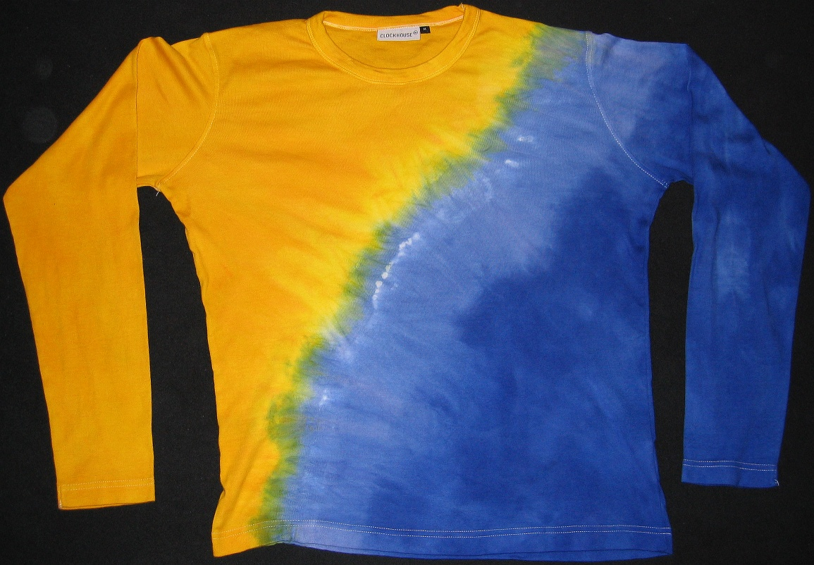 Bildbeschreibung: Batik Quelle: eigene Aufnahme Fotograf: selbst fotografiert von Johann H. Addicks Genehmigung: GFDL, kein wie auch immer geartetes "Gentlemen-Agreement". Bildnutzung ohne Einhaltung der Bestimmungen der GFDL ist kostenpflichtig und wird vom Rechteinhaber in Rechnung gestellt. Zweitlizensierung auf Anfrage. Es gelten die AGB. Datum